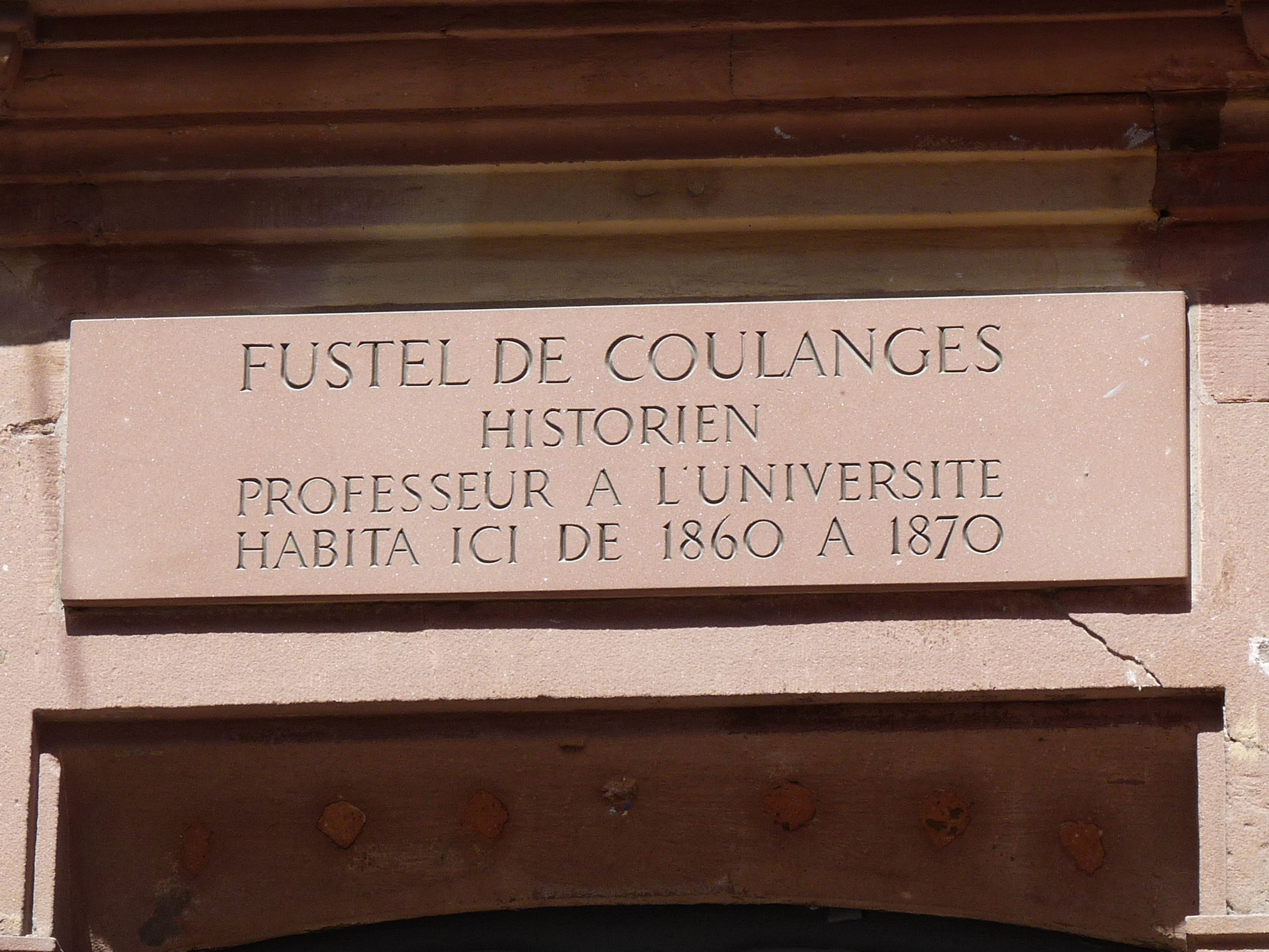 Plaque au 79 Grand'Rue, Strasbourg, sur la maison dans laquelle Fustel de Coulanges vécut de 1860 à 1870.